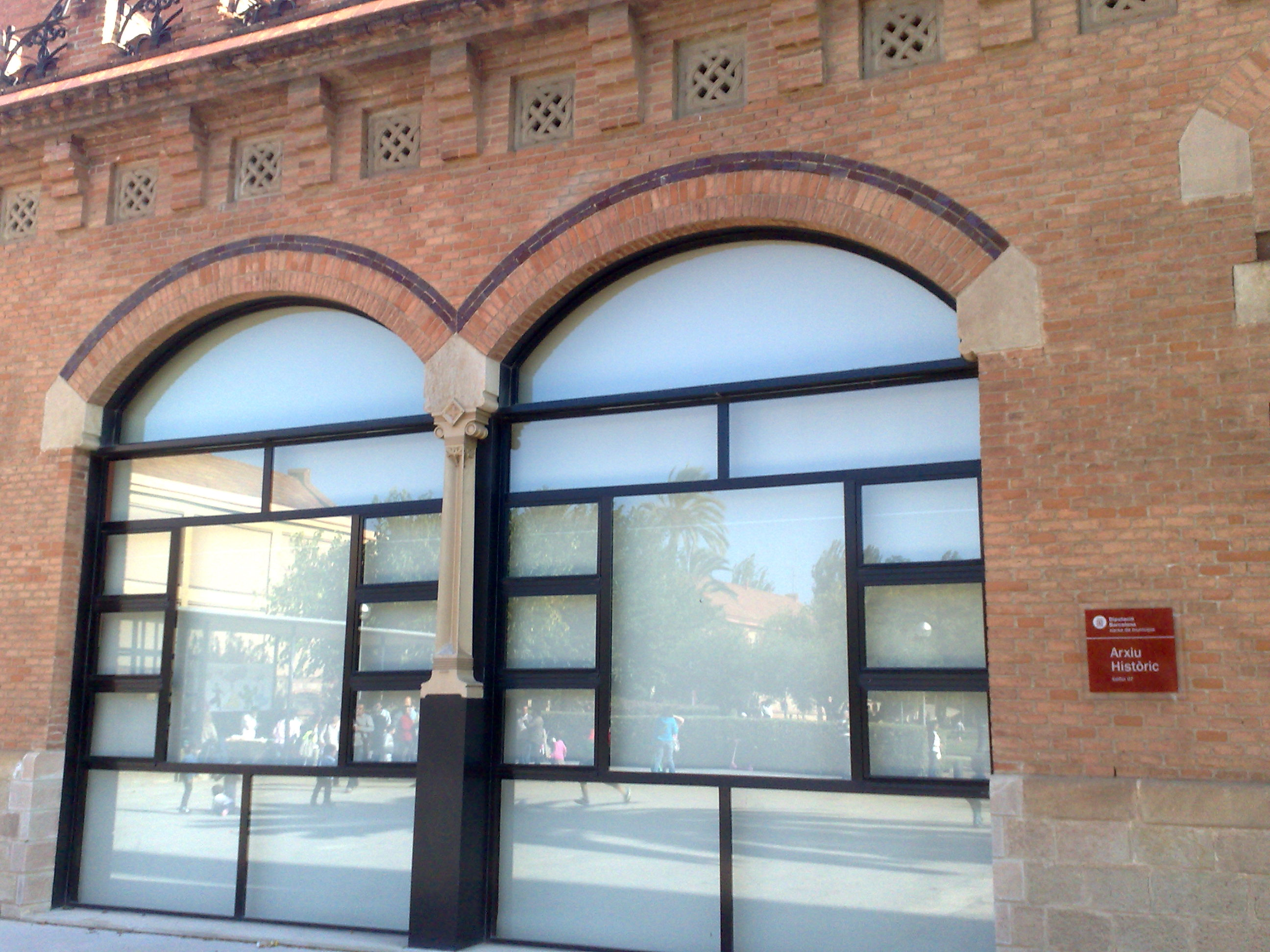 Vista exterior del AHDB, en el recinto de la Maternidad